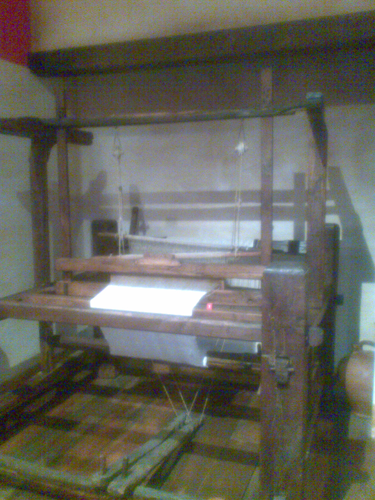 Telar antiguo. Museo de la Técnica de Terrassa